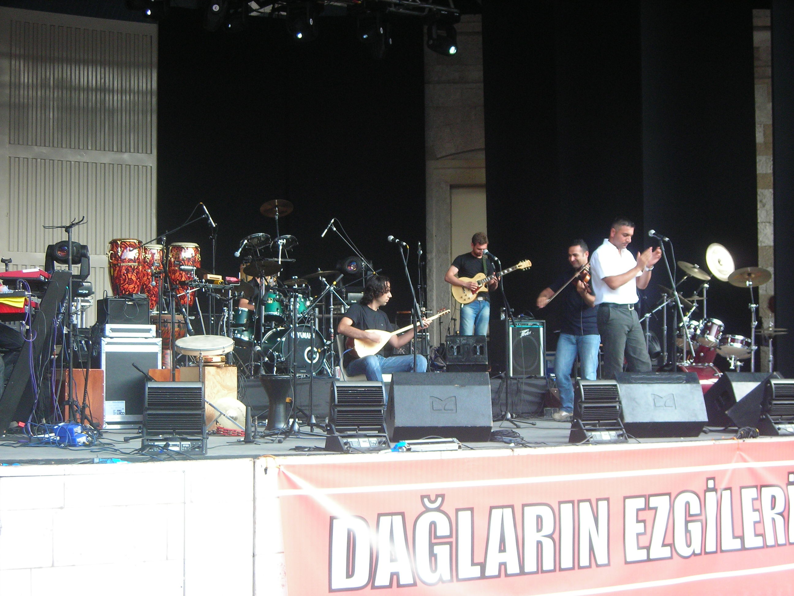 Agirê Jiyan konseri, 3 Temmuz 2009, Istanbul